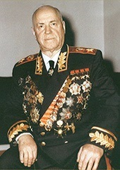 Георгий Константинович Жуков (1896 — 1974) — советский полководец, Маршал Советского Союза